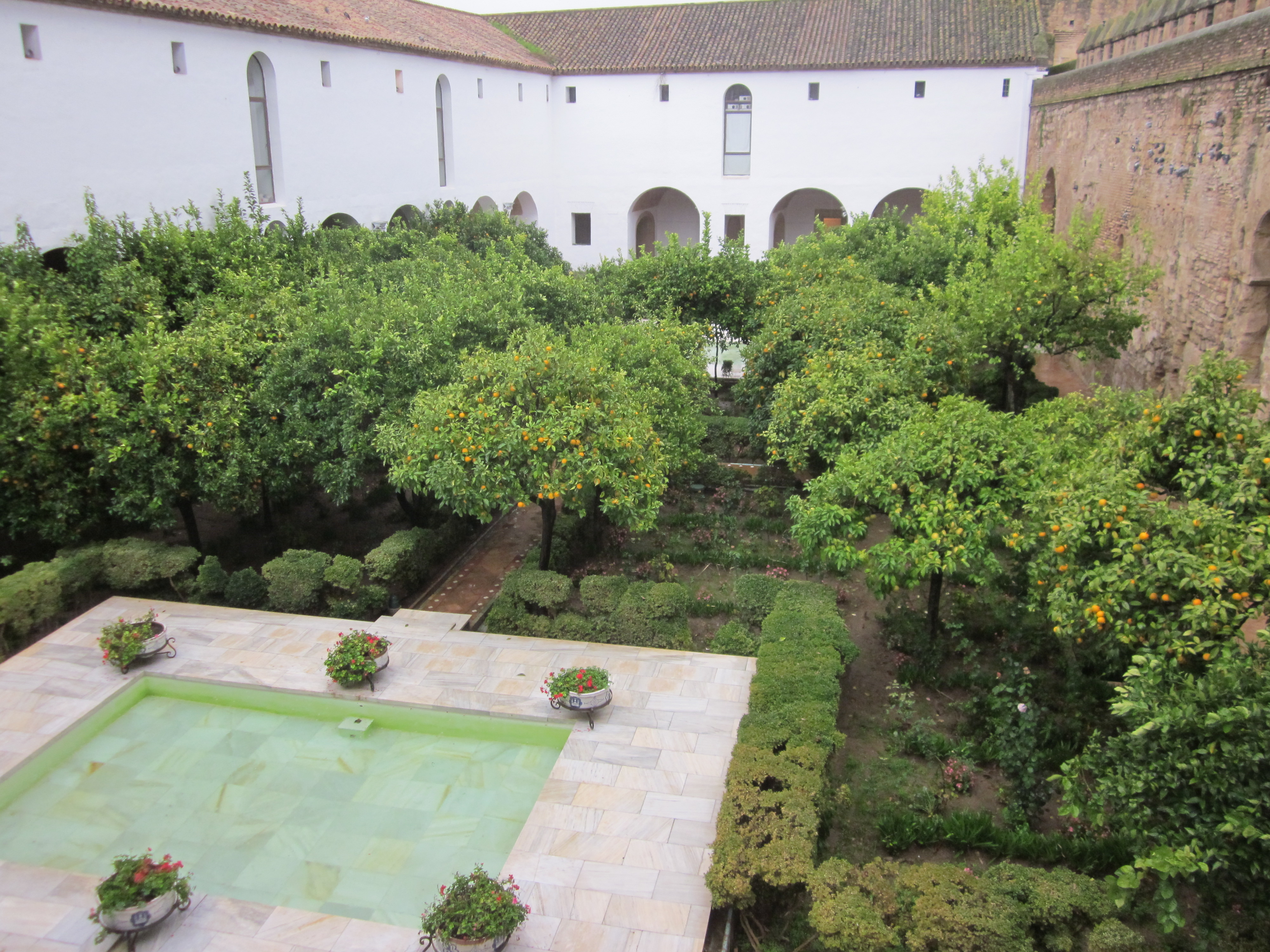 Patio morisco del Alcázar de los Reyes Cristianos, Córdoba (España).